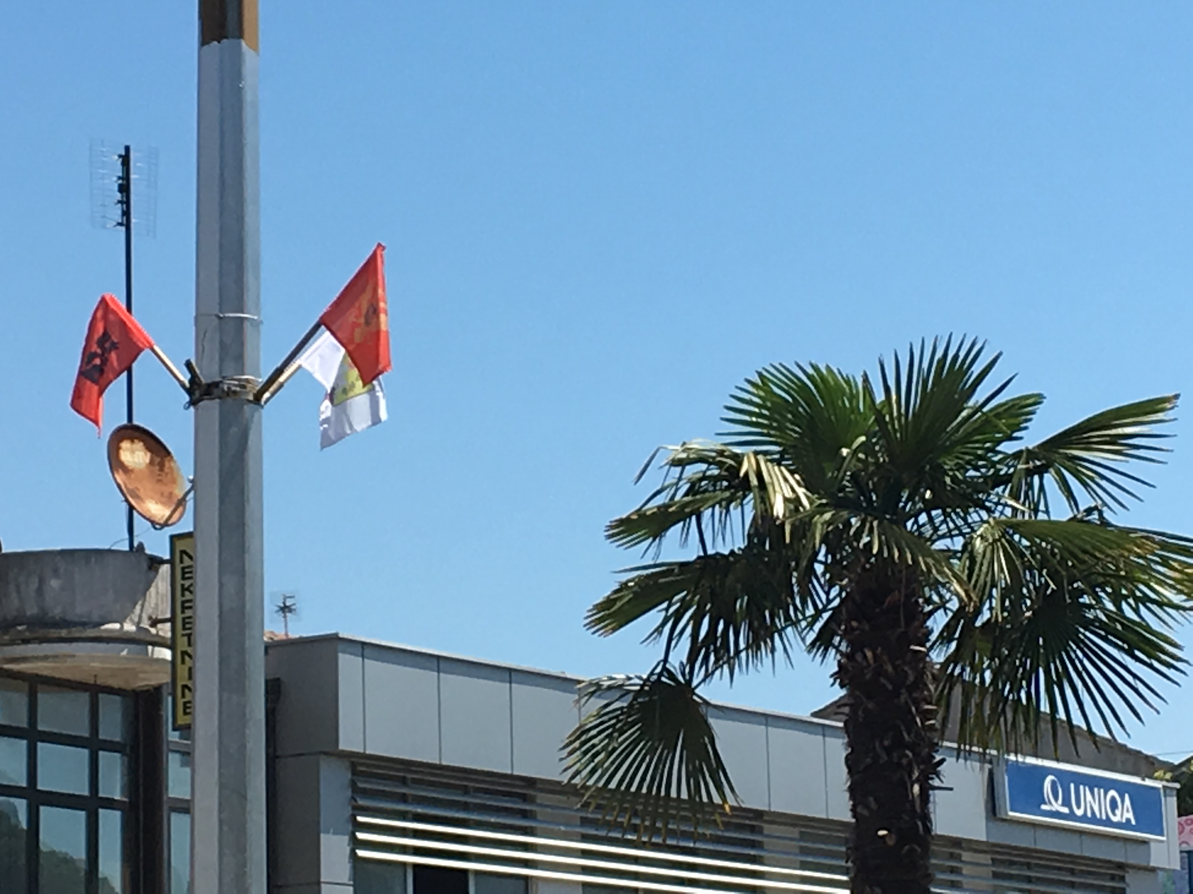 Flamuri i Ulqinit, Malit të Zi dhe Shqipërisë